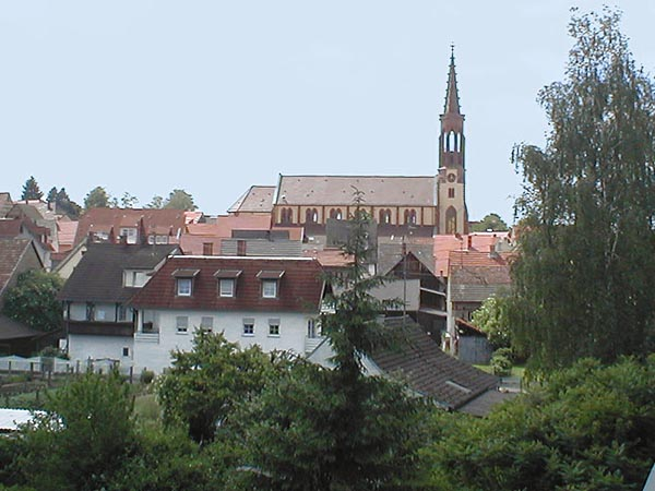 Blick über Waibstadt mit der weithin sichtbaren Katholischen Pfarrkirche Unserer lieben Frau